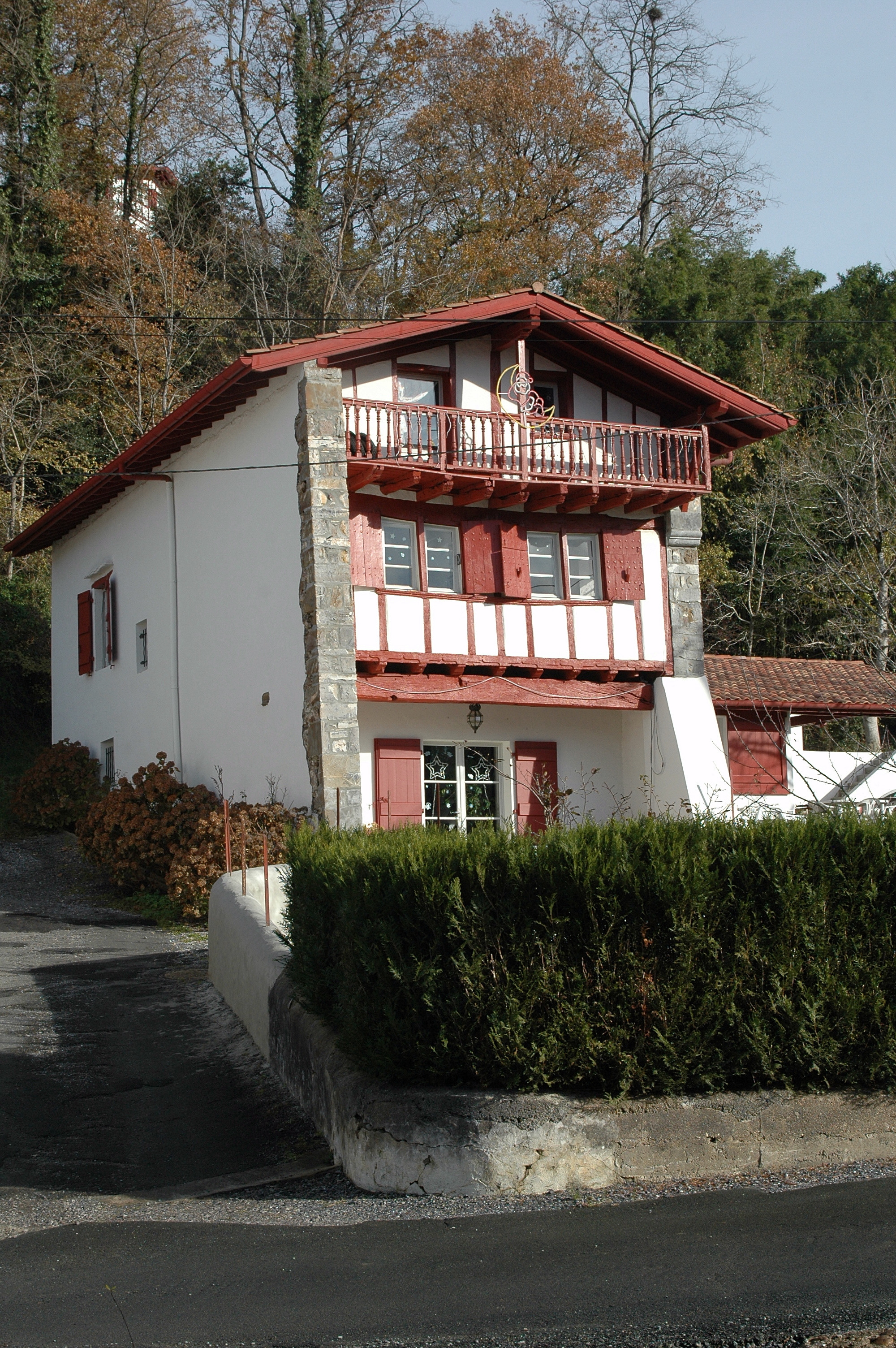 Bas-Cambo, maison labourdine, photo prise le 31/12/06 par Harrieta171